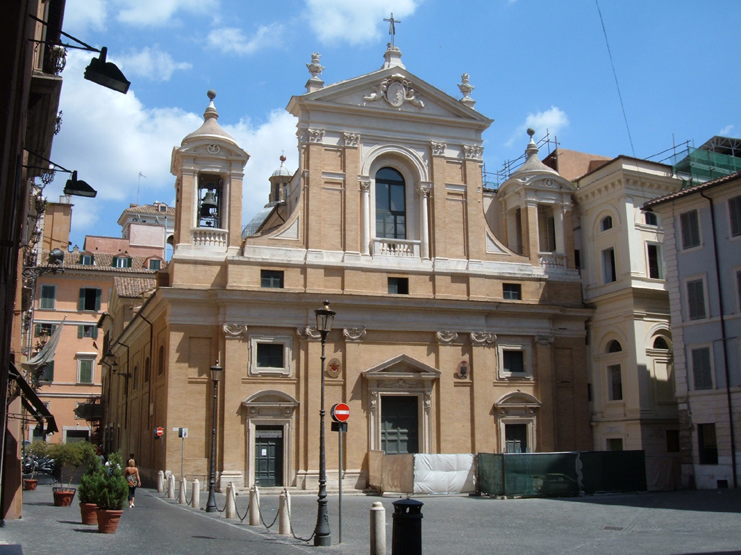 Chiesa di S. Maria in Aquiro, a Roma, piazza Capranica, nel rione Colonna.